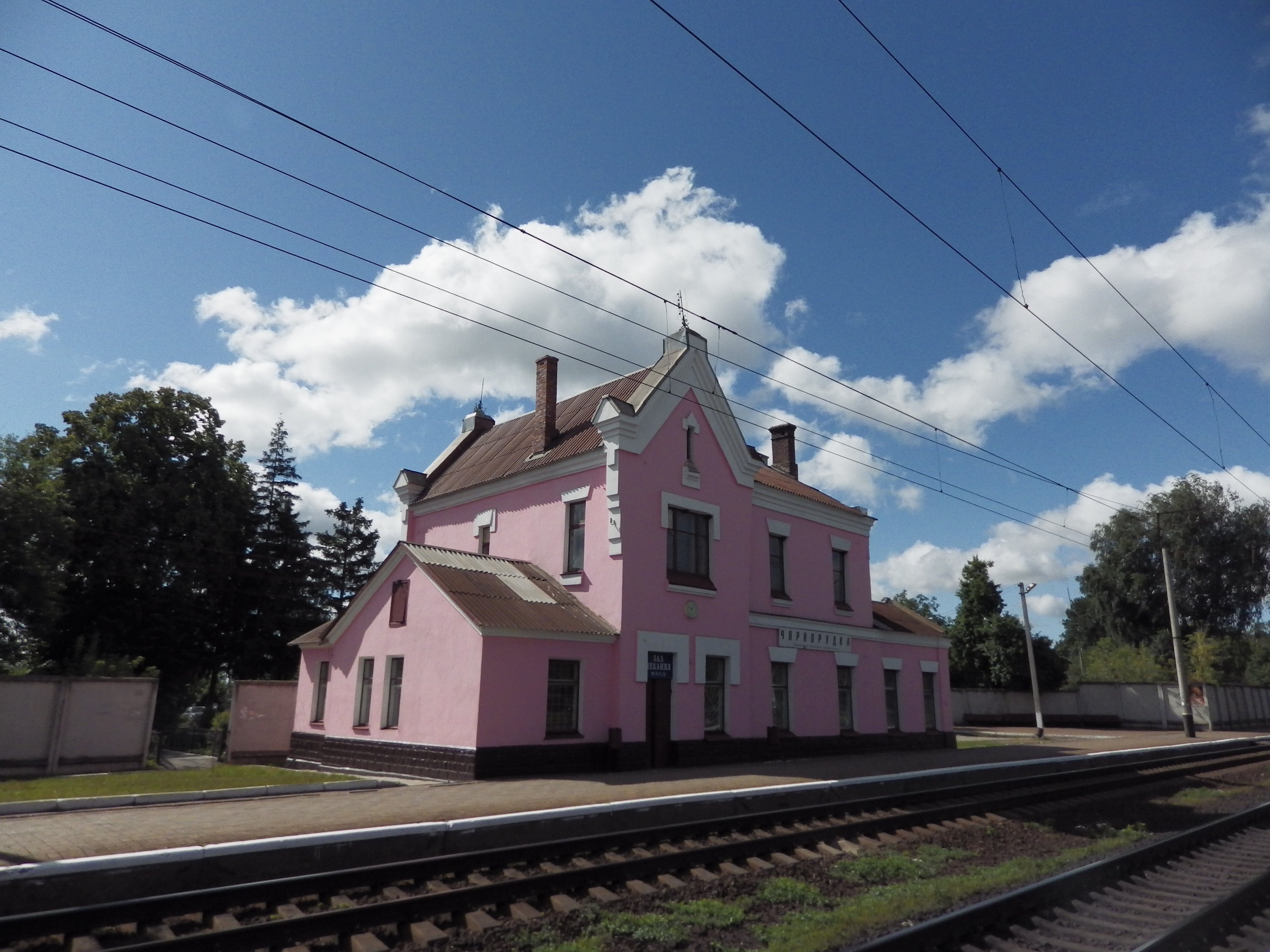 Будівля залізничної станції «Чорнорудка», с. Жовтневе